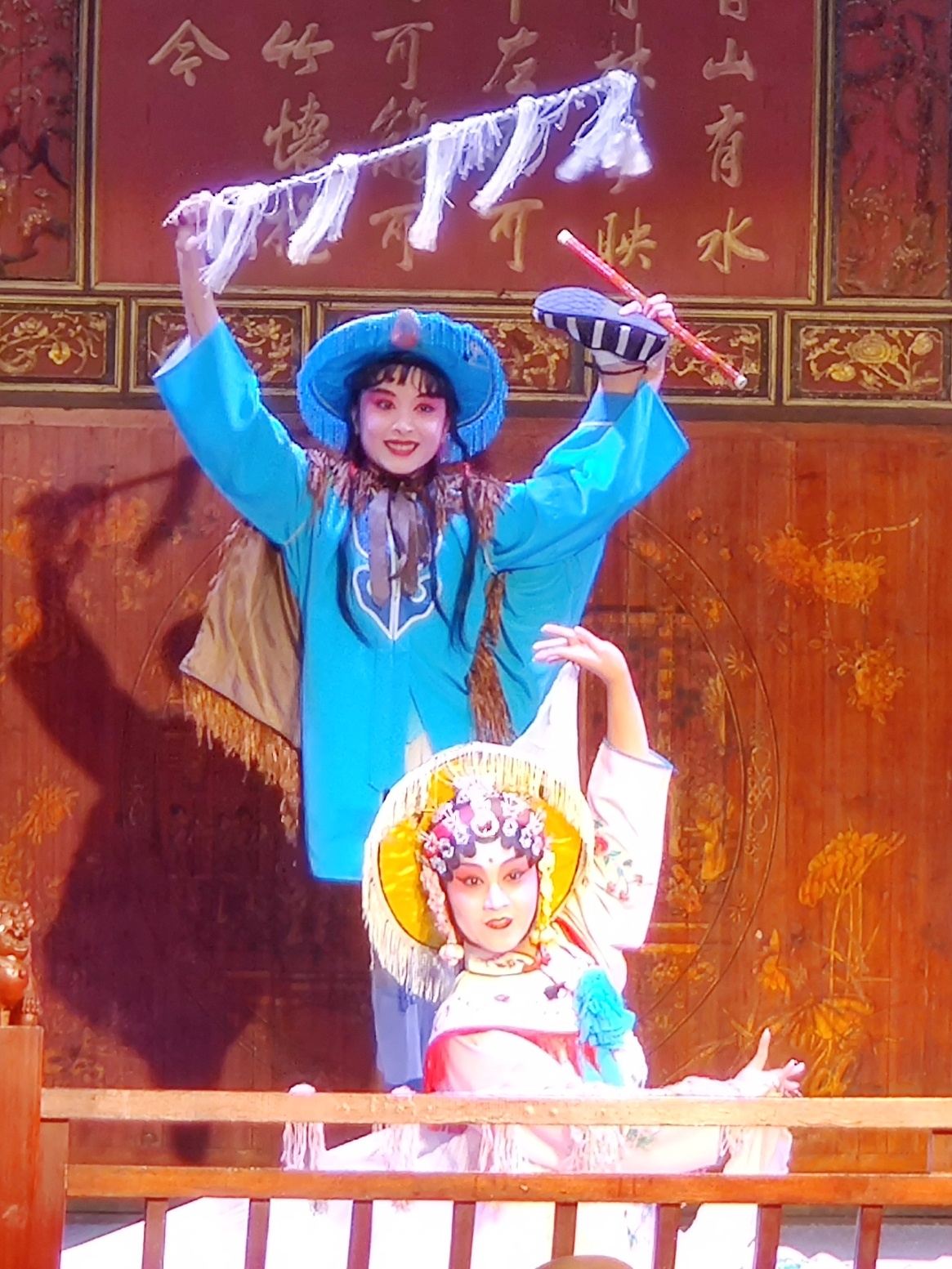 中文（中国大陆）: 牧童 薛萍 饰。村姑 李熹格 饰。